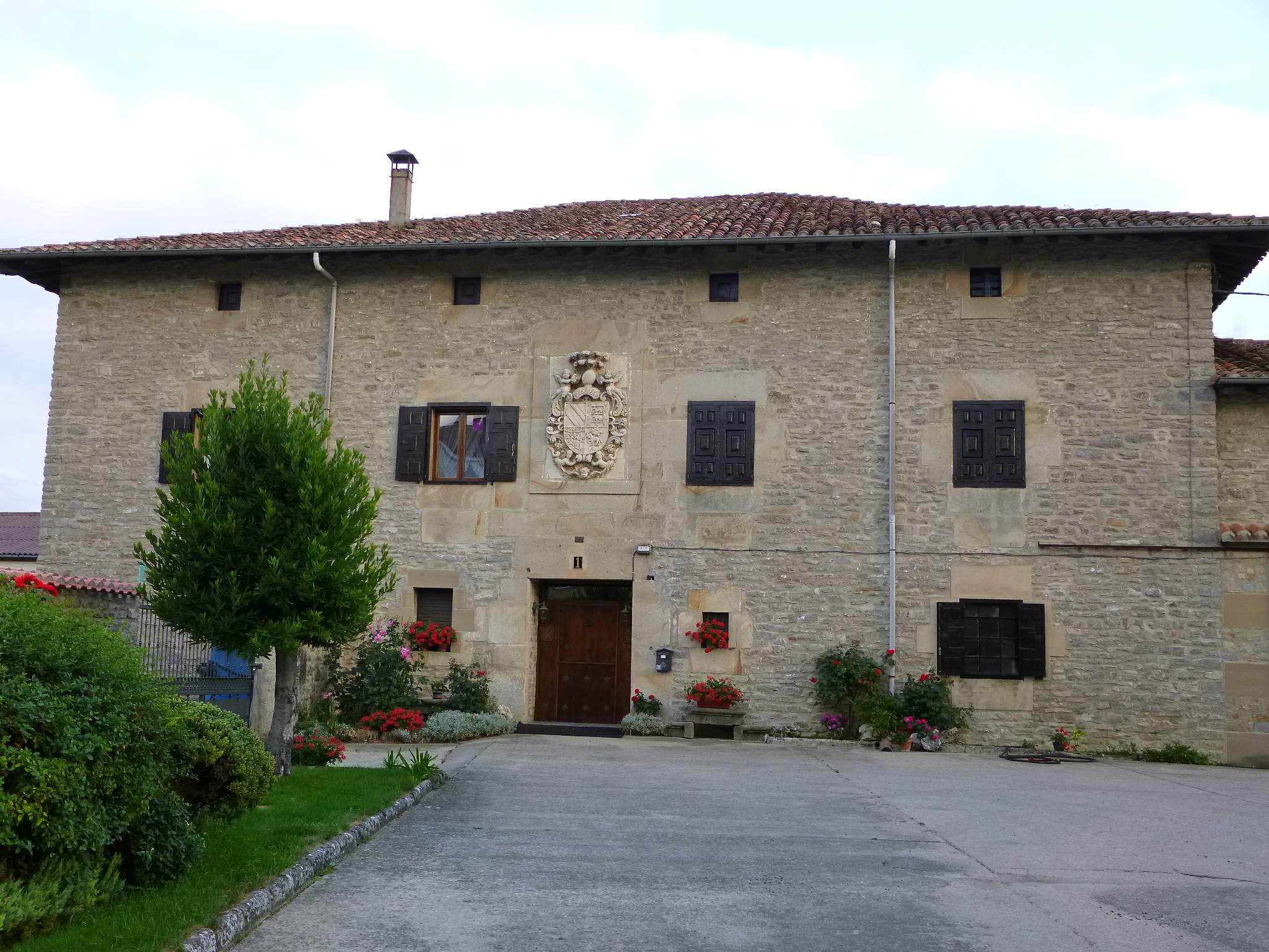 Astegieta (Vitoria, Álava)